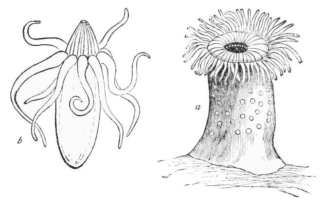 Sea anemones